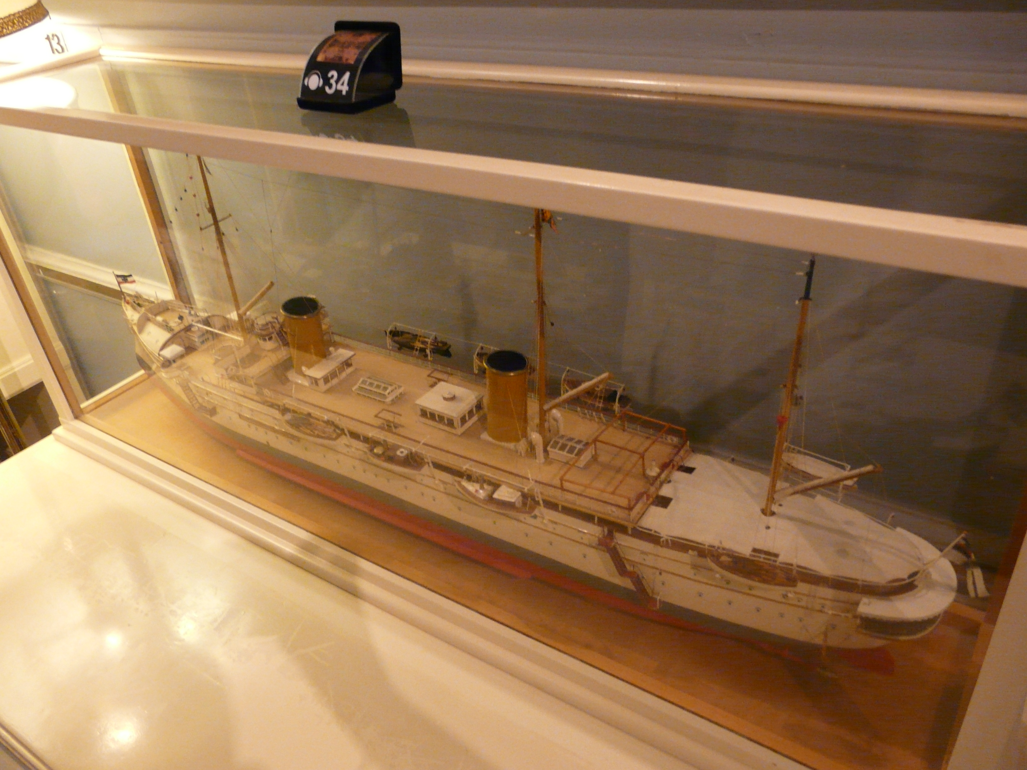 SMY Hohenzollern (1892), Achilleion